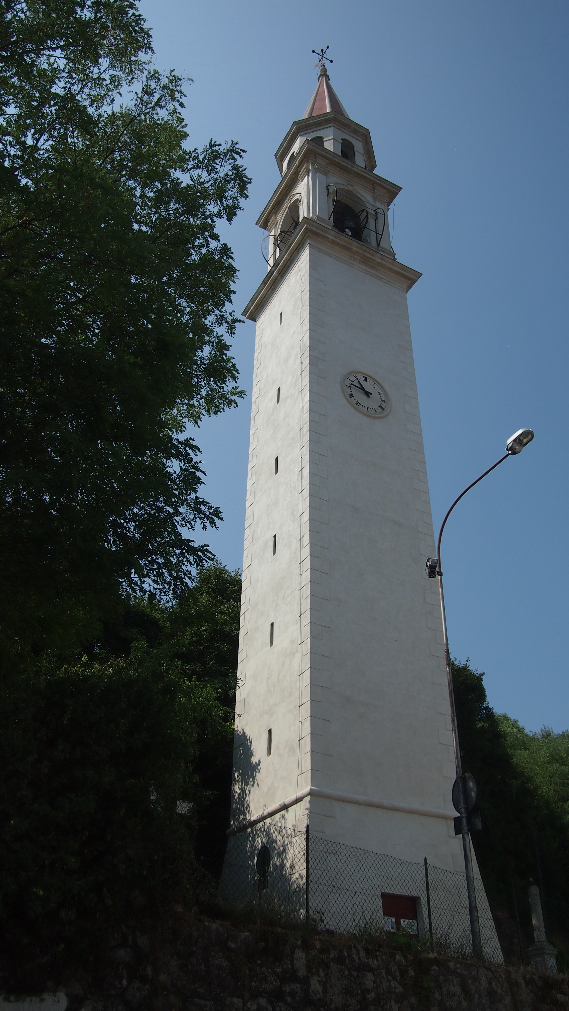 Campanile della chiesa di San Giovanni Battista a Pianezze di Arcugnano, in provincia di Vicenza visto da nord-est.